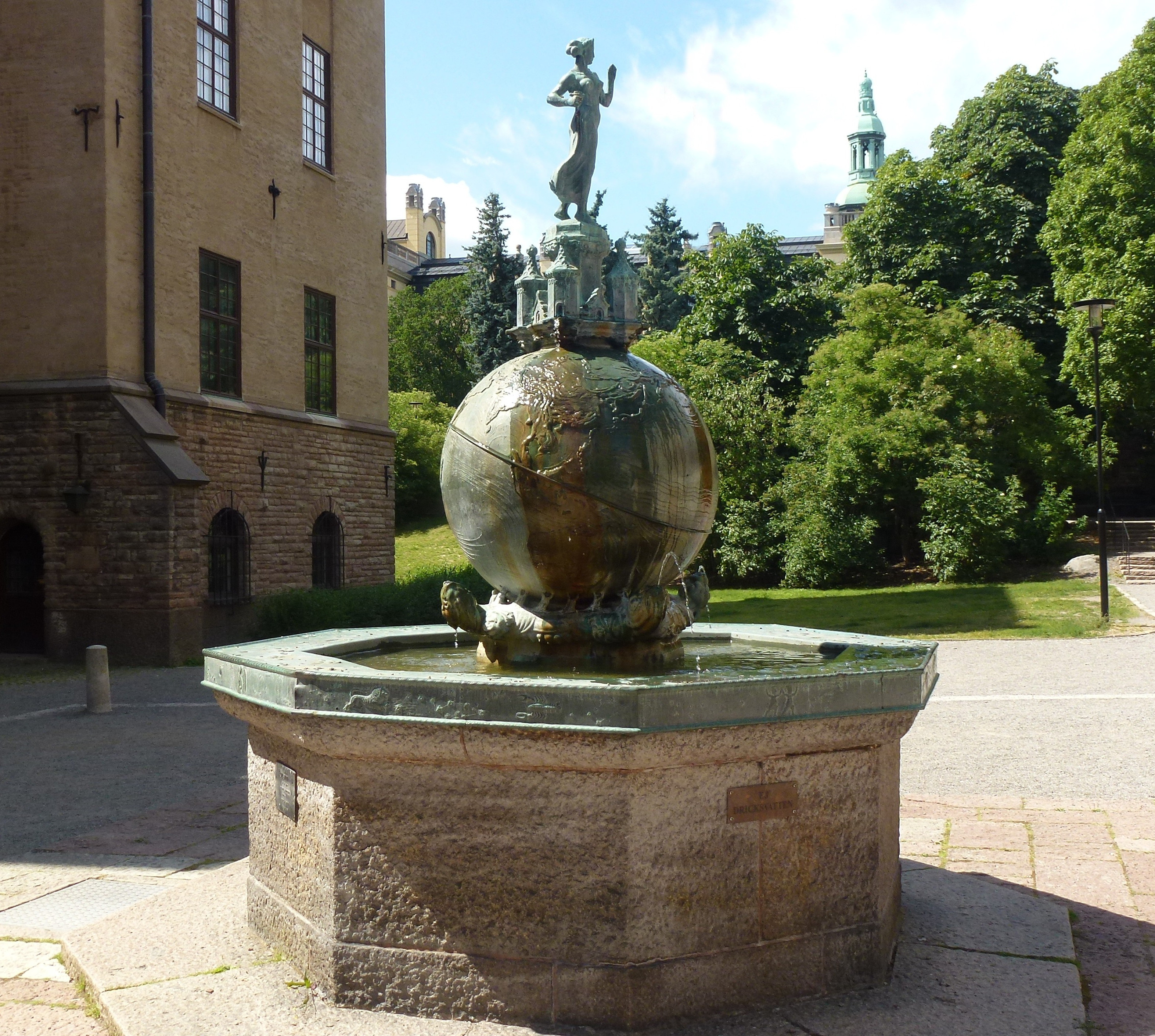 Justitiabrunnen